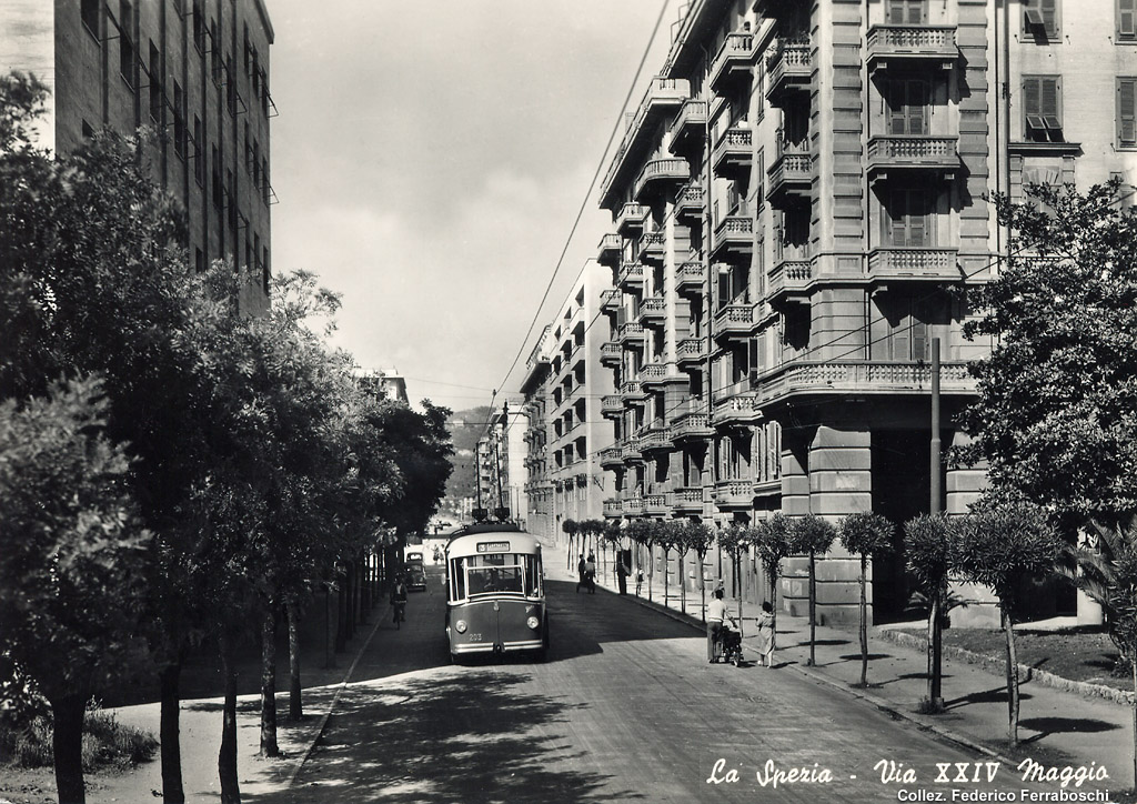 Il Fiat 668F Viberti, matricola 203, della FITRAM della Spezia, in servizio sulla linea 3 in corso XXIV Maggio